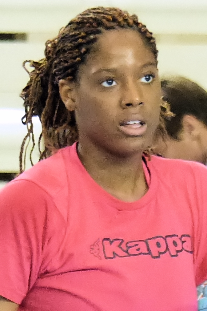 Audrey Bruneau, arrière gauche de l'équipe du Fleury Handball. Le 14 mai 2014.